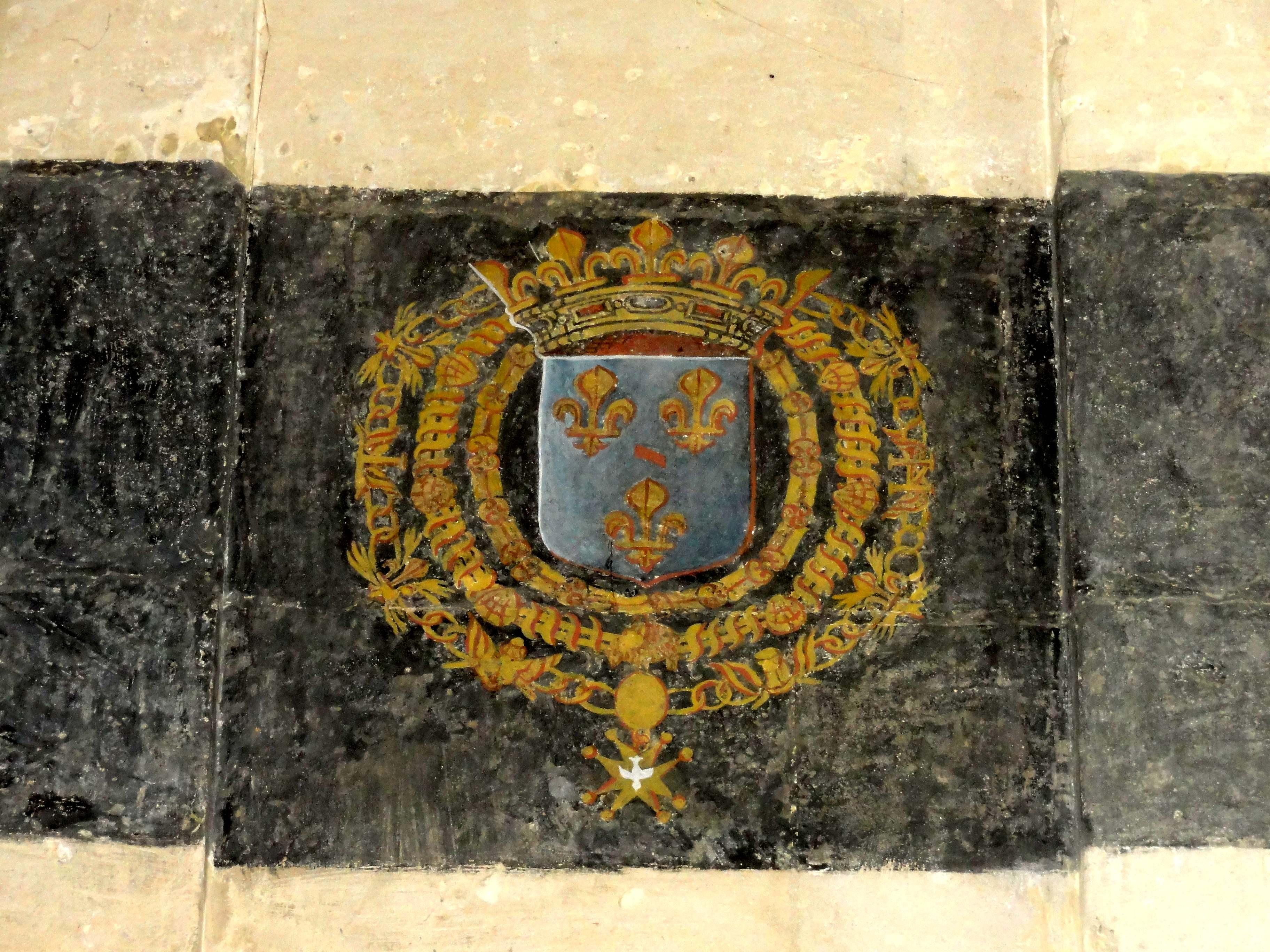 Intérieur de l'église - voir titre.